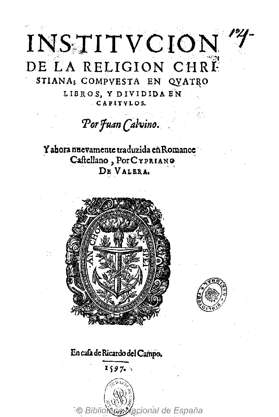 Portada de la traducción al español de Cipriano de Valera de la Institución de la religión cristiana de Juan Calvino conservada en la Biblioteca Nacional de España.